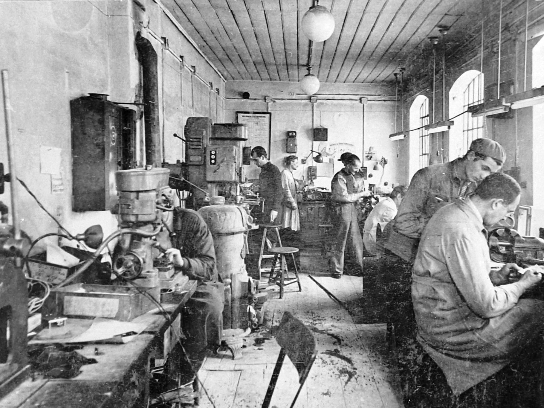 Elektromos Mérőműszerek Gyára R.T. belülről.